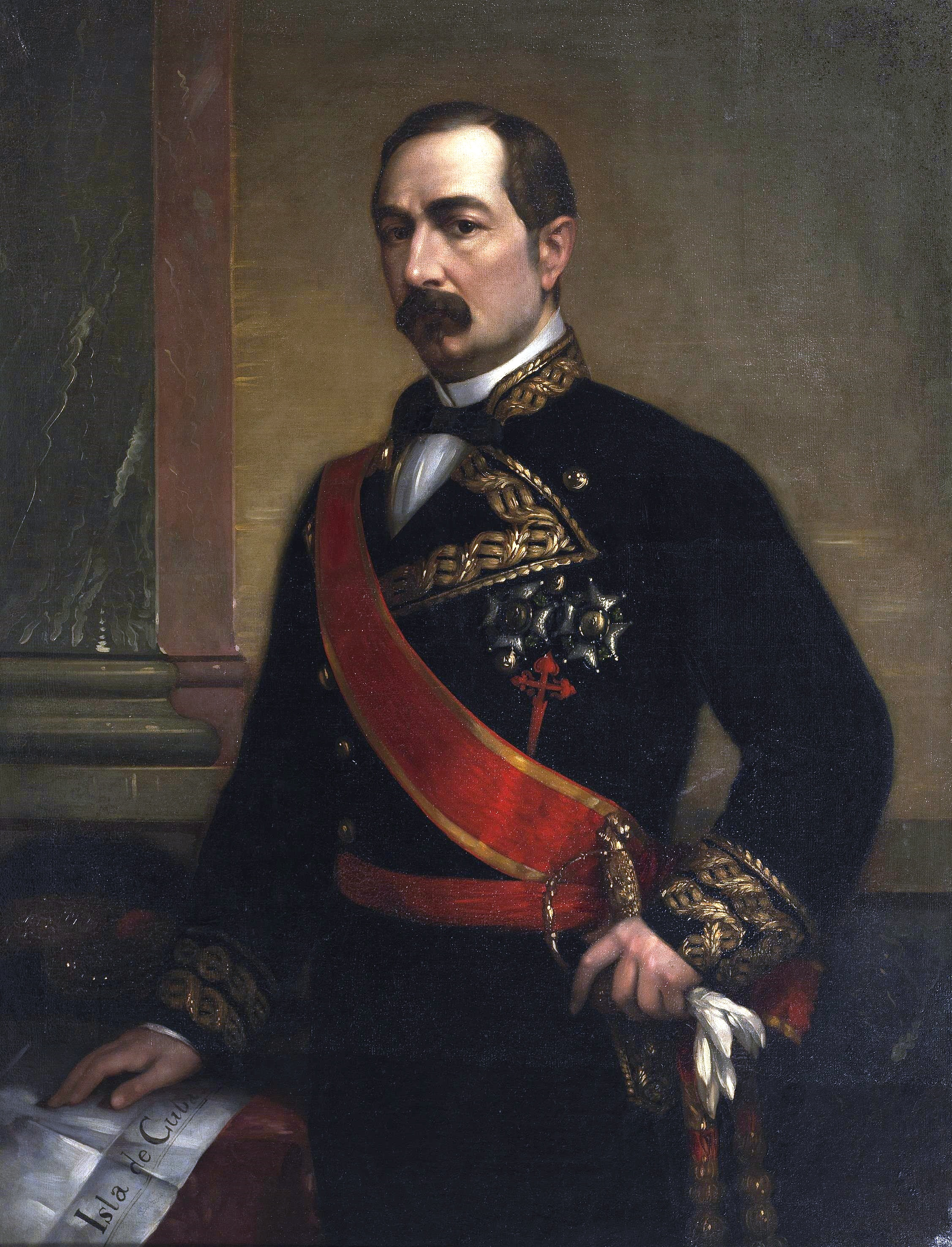 Retrato del general español José Gutiérrez de la Concha (1809-1895), que ostentó los títulos de marqués de La Habana y vizconde de Cuba junto con la Grandeza de España y que fue hermano del célebre general Manuel Gutiérrez de la Concha, marqués del Duero. Además, el general José Gutiérrez de la Concha llegó a ser presidente del Consejo de Ministros de España, ministro de varias carteras en diferentes periodos y también caballero de la Orden del Toisón de Oro y de la Orden de Santiago, cuya cruz roja luce sobre su uniforme en este retrato.